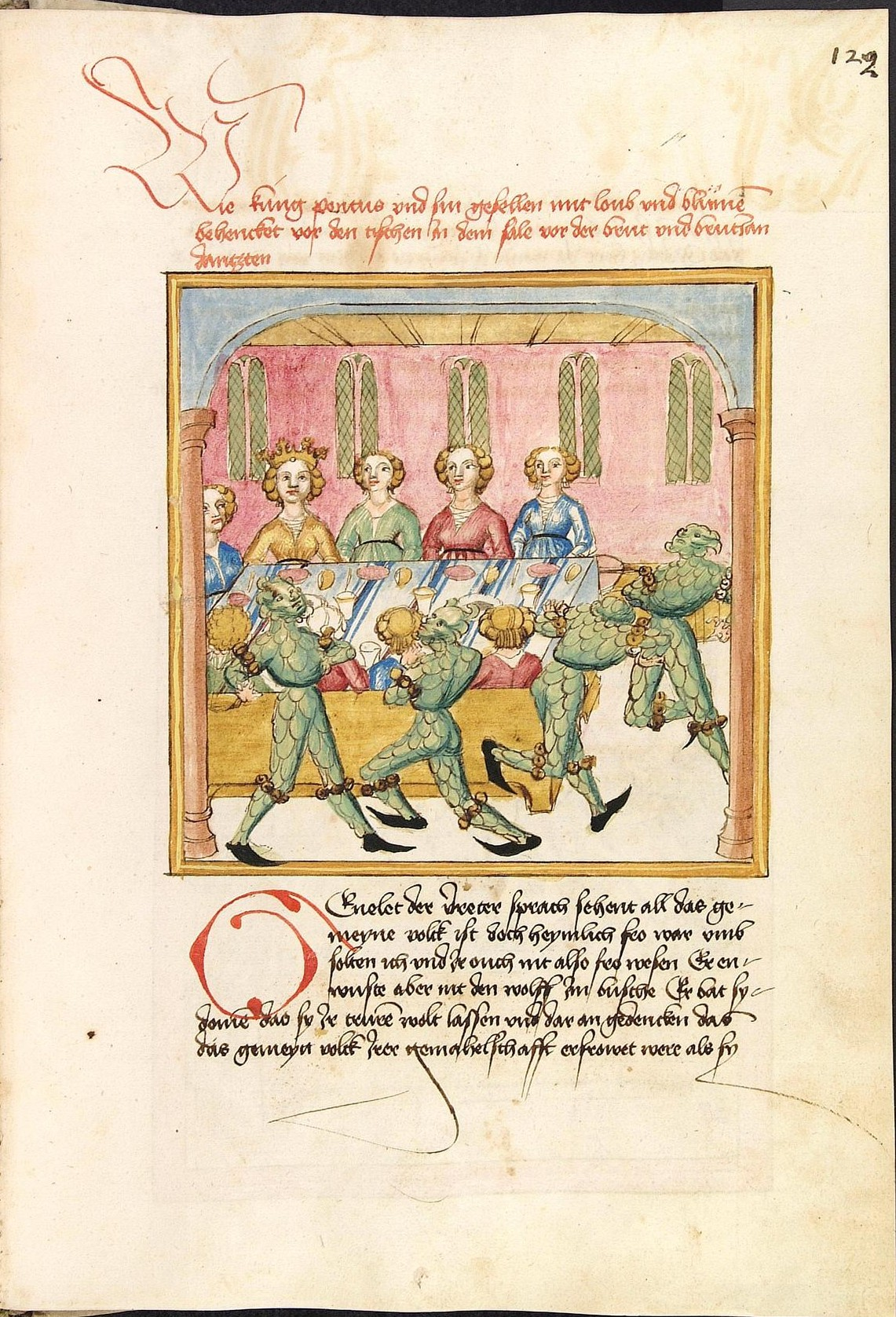 Cod. Pal. germ. 142, Blatt 122r - Pontus und Sidonia - Pontus und seine Gefährten haben sich als Wildmänner verkleidet und verhindern die Hochzeit von Sidonie und Genelet